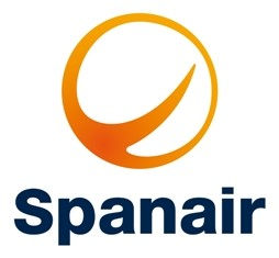 neues Logo der Spanair